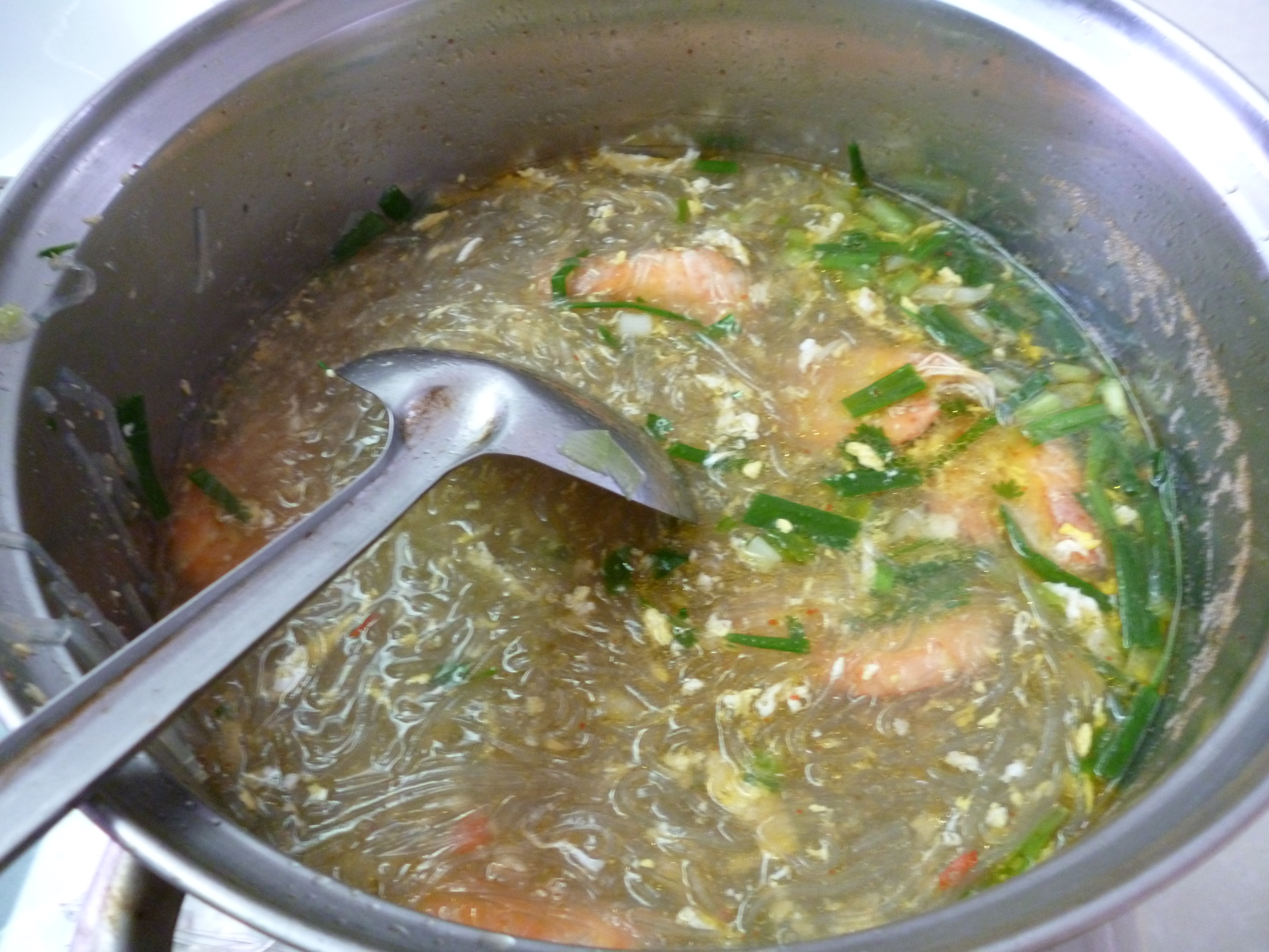 Hình tự chụp bằng máy ảnh cá nhân về món miến cua do gia đình chế biến, chụp tại Sài Gòn